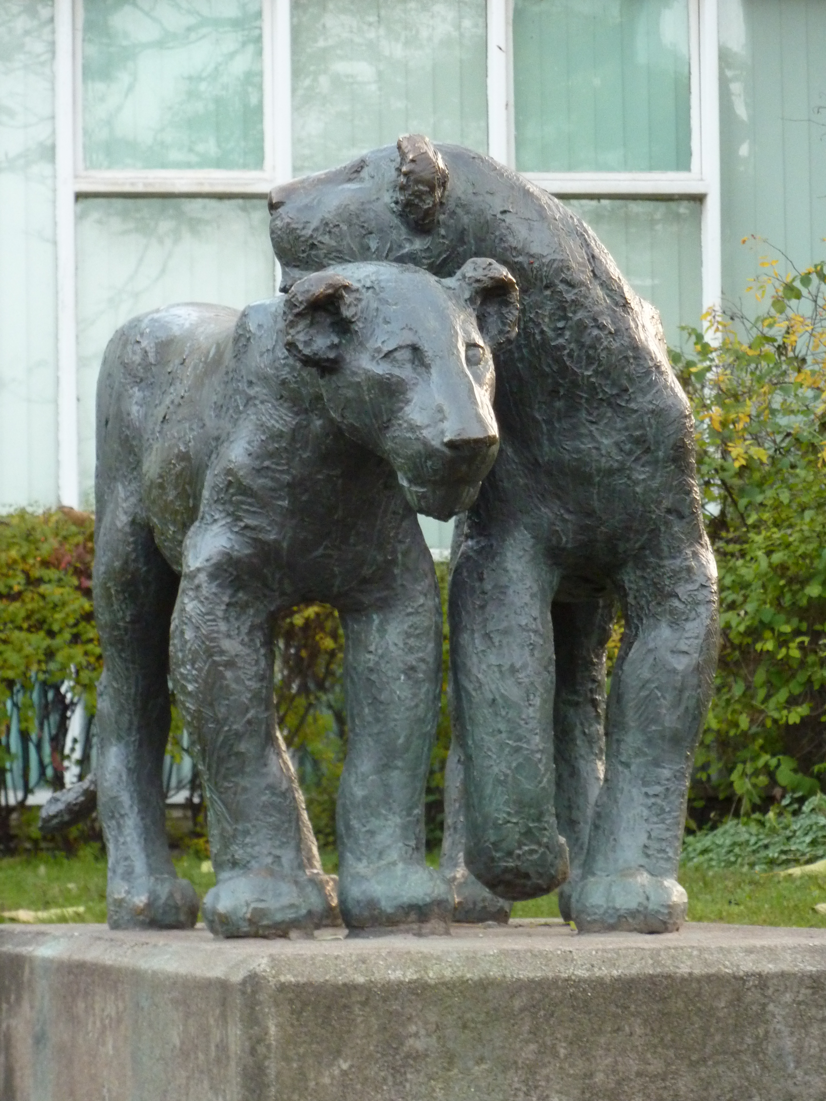 Bronzegruppe "Junge Löwen" von Sonja Eschefeld aus dem Jahr 1985. Standort im Innenhof des Alfred-Brehm-Hauses im Tierpark Berlin (Friedrichsfelde).